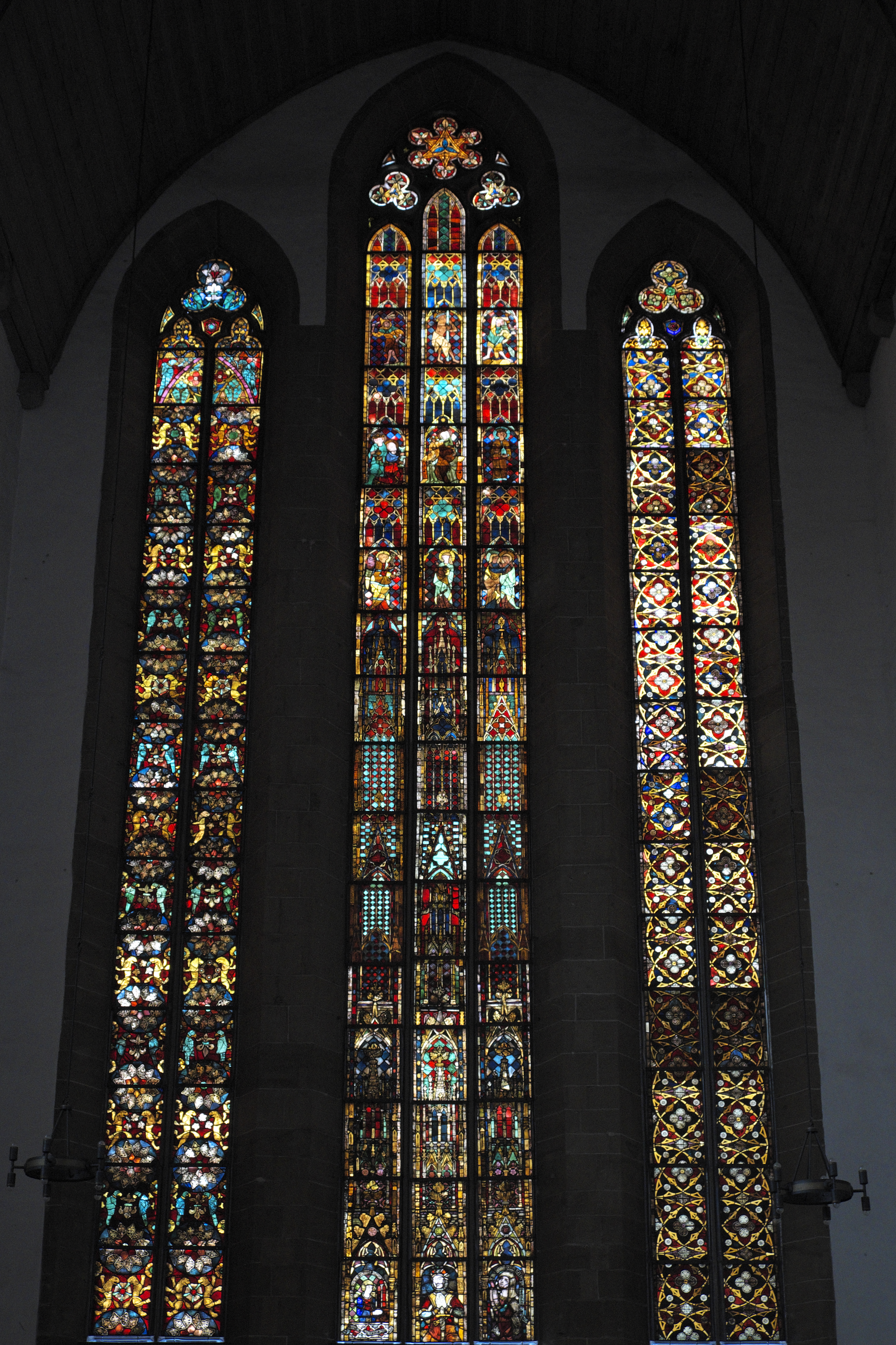 Chorfenster in der Kirche des ehemaligen Augustinerklosters in Erfurt in Thüringen (Deutschland)